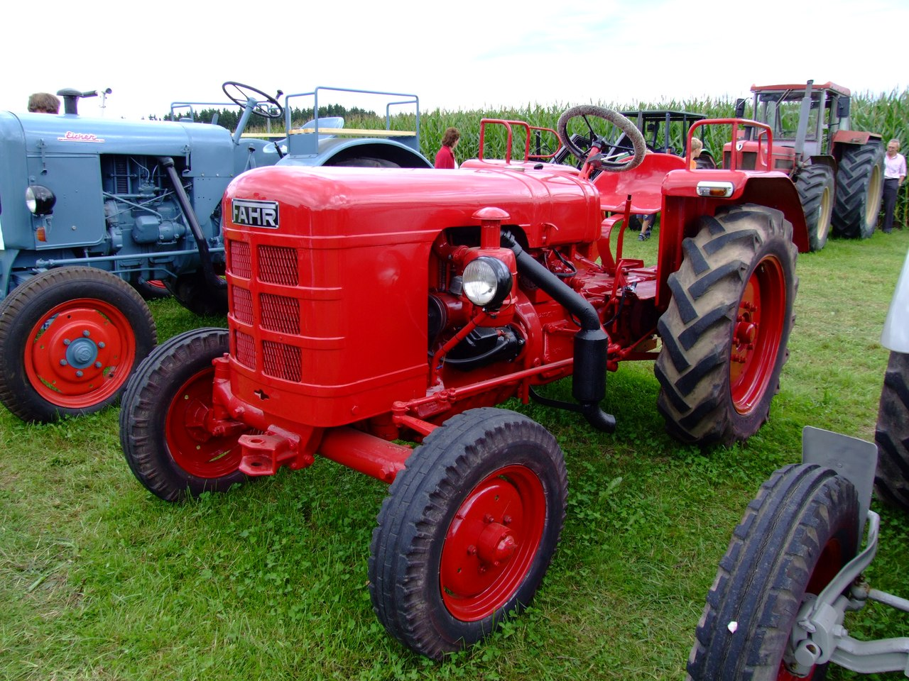 Fahr D 270 mit 28 PS, Baujahr 1958